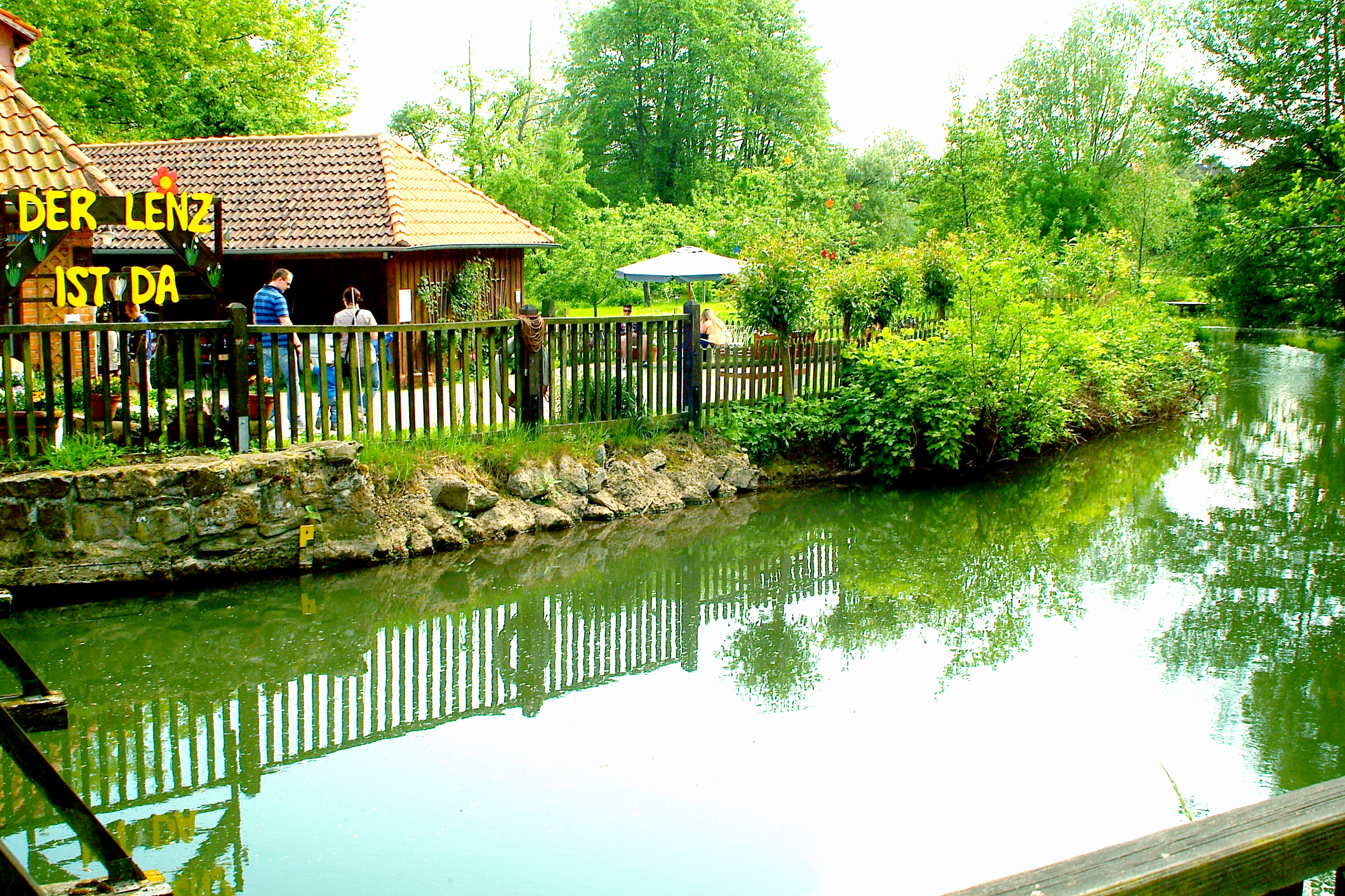 Auswahl von Ansichten aus Emmerthal-Hämelschenburg, die Ortschaft rund um Schloss Hämelschenburg mit ihren jahrhundertealten Geschichten bis in die Gegenwart.